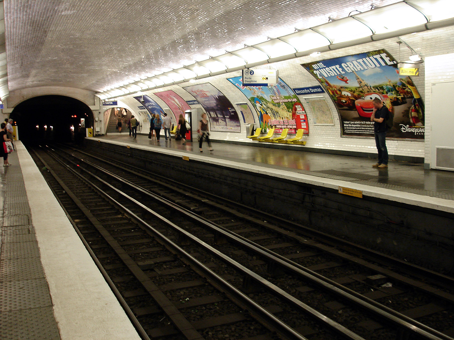 La station Alexandre Dumas de la ligne 2 du métro de Paris, France